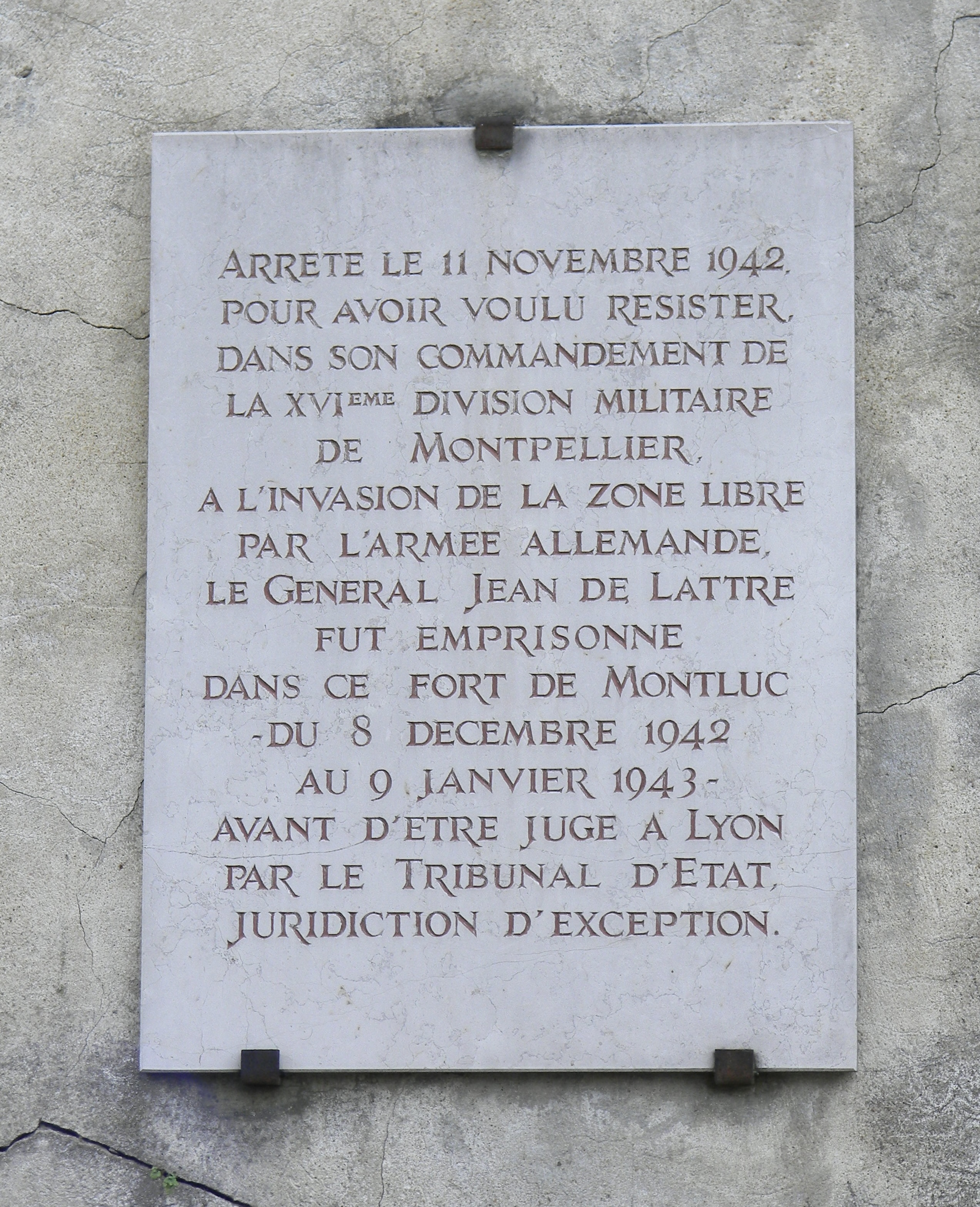 Arrêté le 11 novembre 1942 pour avoir voulu résister, dans son commandement de la XVIème division militaire de Montpellier, à l'invasion de la zone libre par l'armée allemande, le Général Jean de Lattre fut emprisonné dans ce fort de Montluc -du 8 Décembre 1942 au 9 Janvier 1943- avant d'être jugé à Lyon par le tribunal d'état, juridiction d'exception.